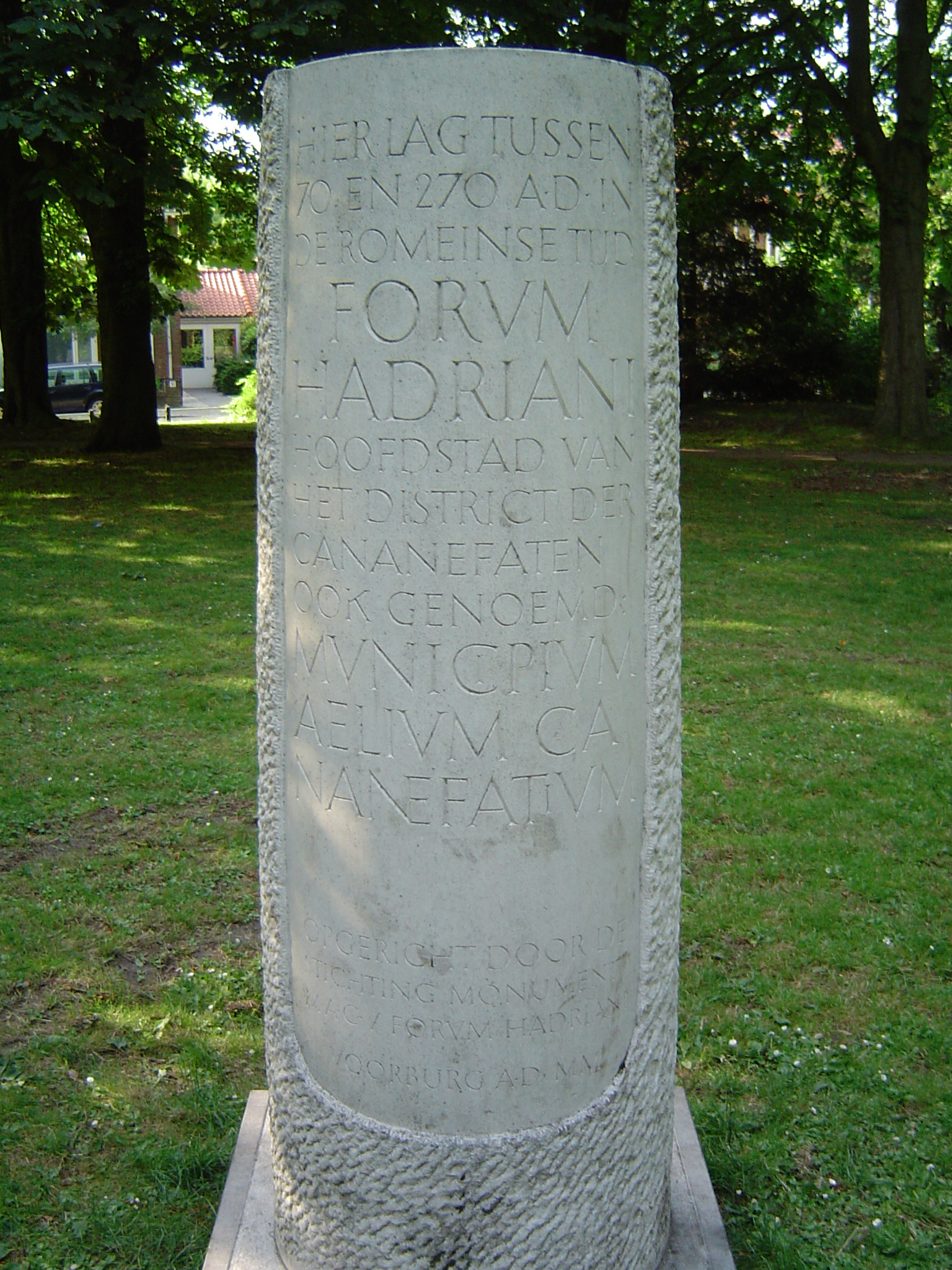 Gedenkpaal voor Forum Hadriani, Park Arentsburg, Voorburg Gemaakt door J. van Rooden op 24-06-2006